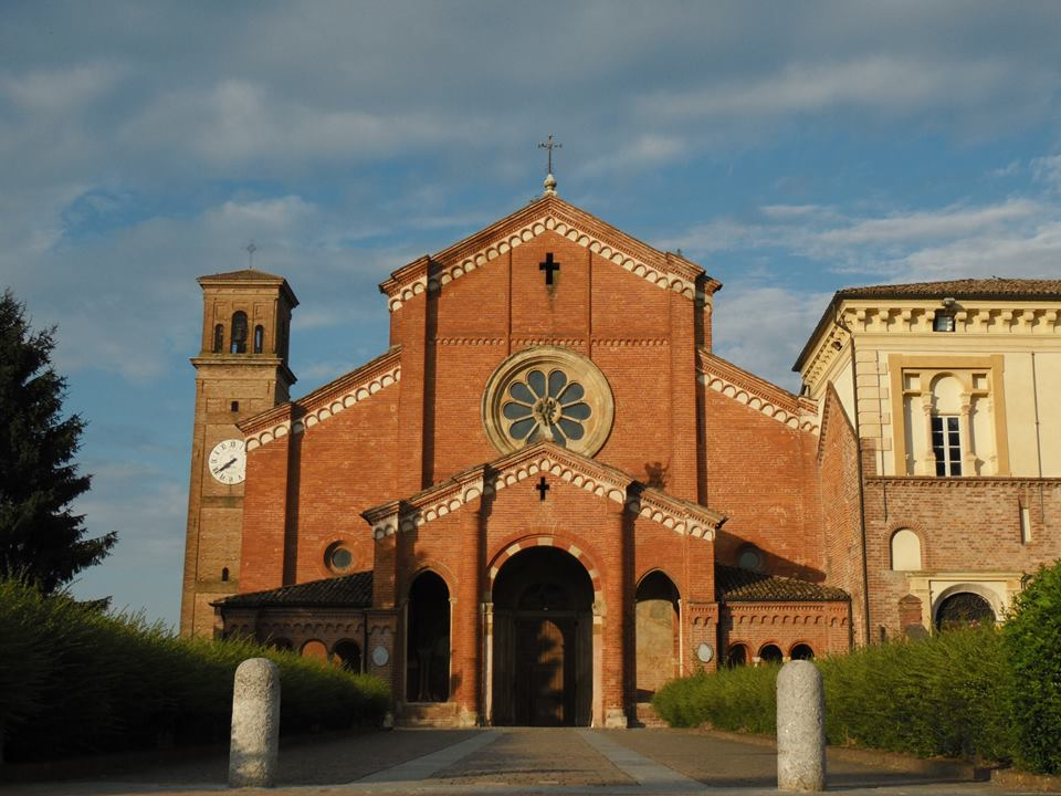 Scatto effettuato al tramonto di fronte alla facciata principale dell'Abbazia.